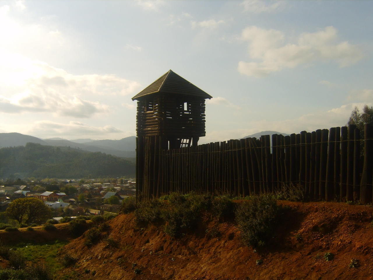 Fuerte de Purén en Chile, al fondo vista de la ciudad de Purén.